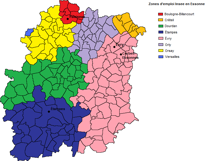 Carte des communes de l'Essonne par zones d'emploi Insee